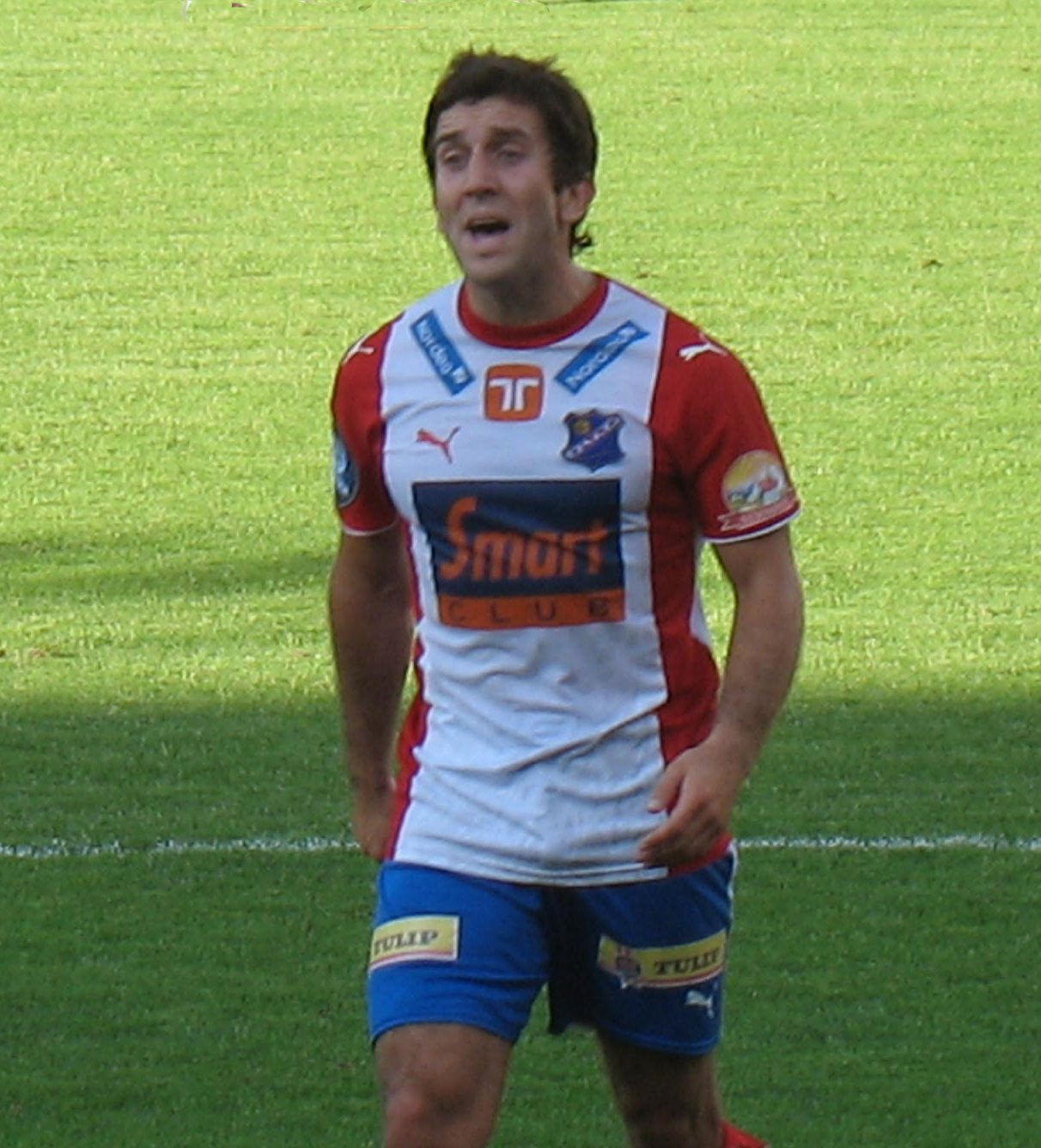 Fotballspilleren Espen Hoff